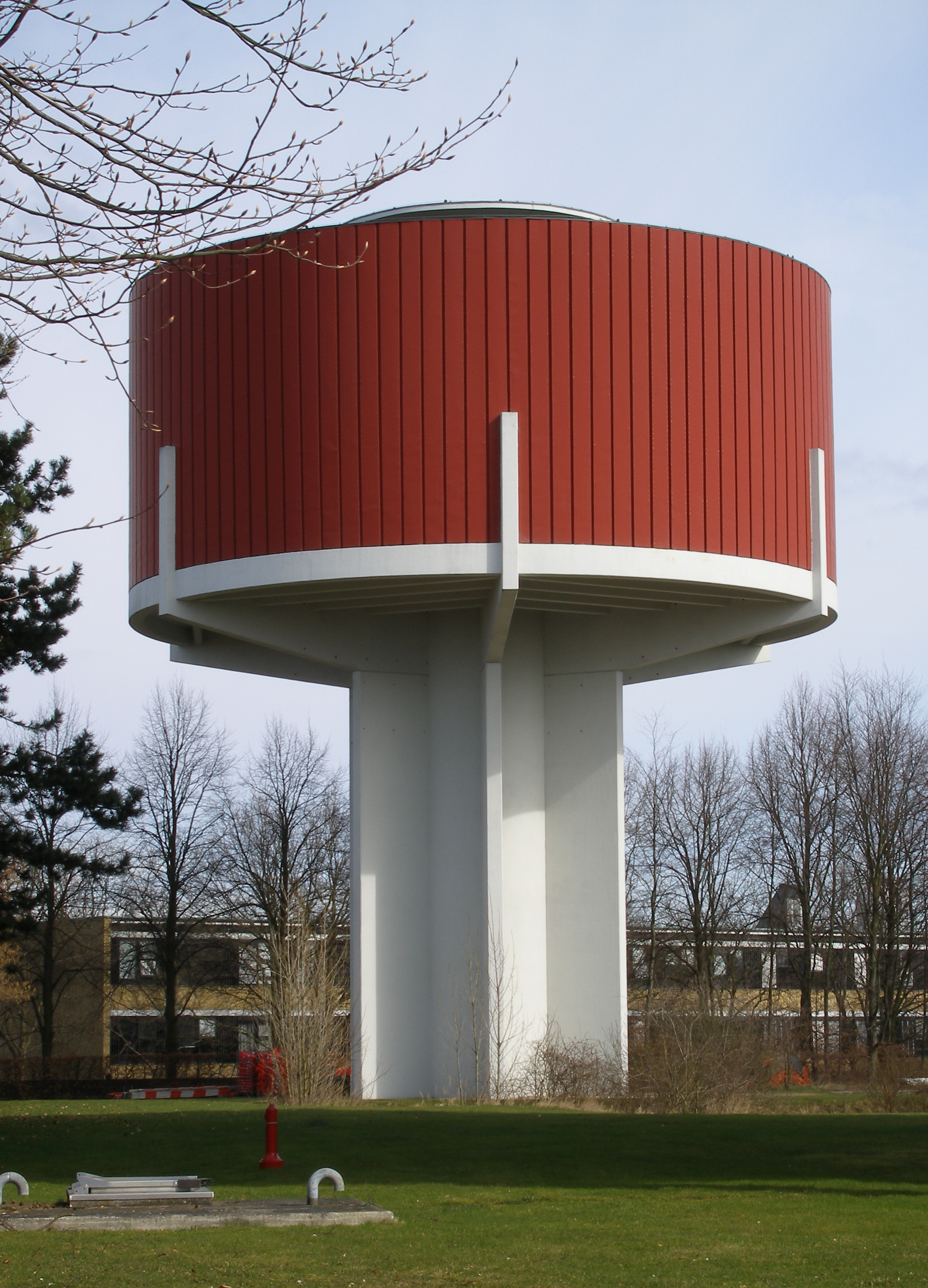 Det "røde" vandtårn på Danmarks Tekniske Universitet (DTU), Lyngby